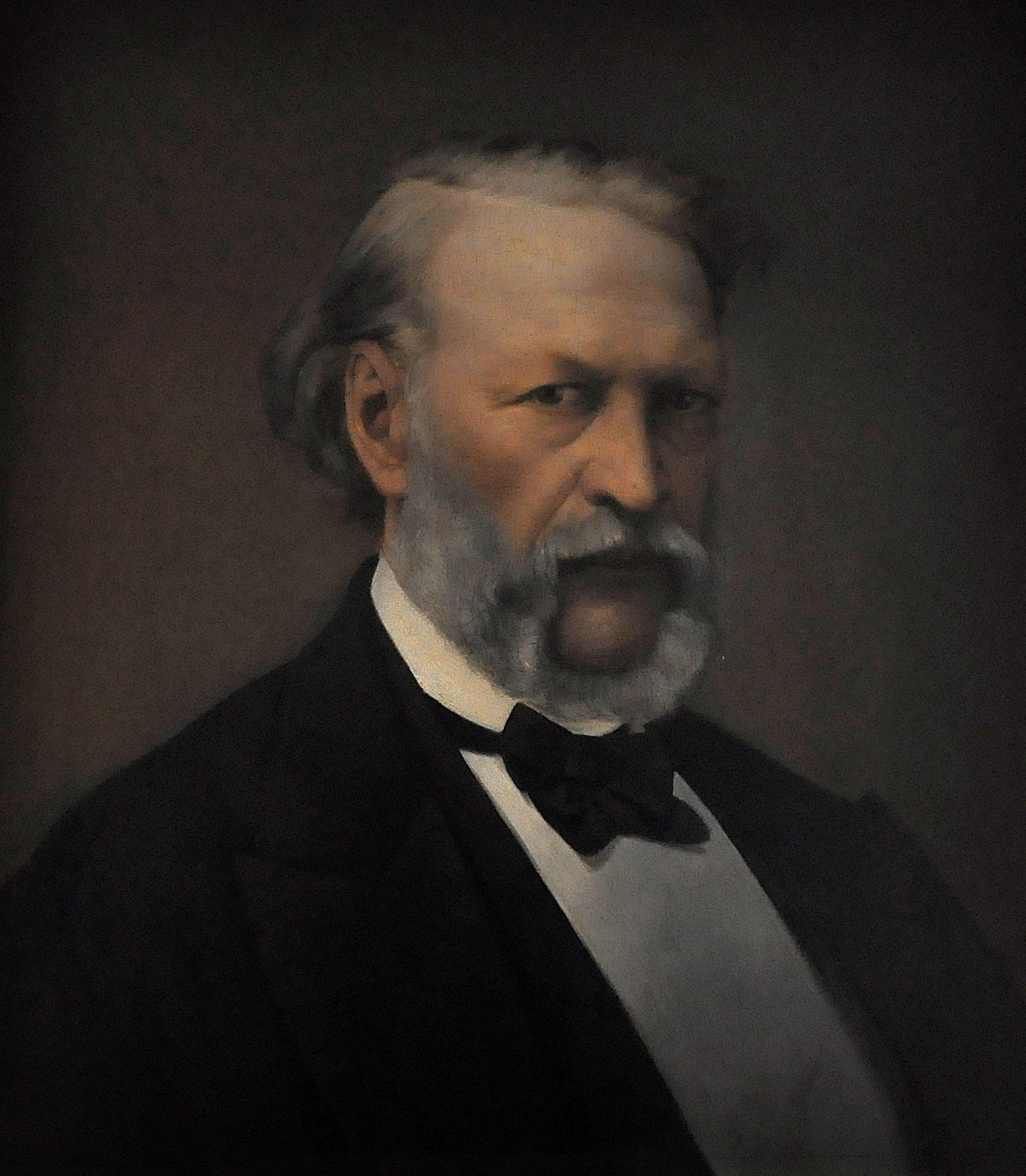 Schilderij van Henri De Pondt (19e eeuw) van Hendrik Conscience (ca. 1870) in het museum Kortrijk 1302 in Kortijk, België